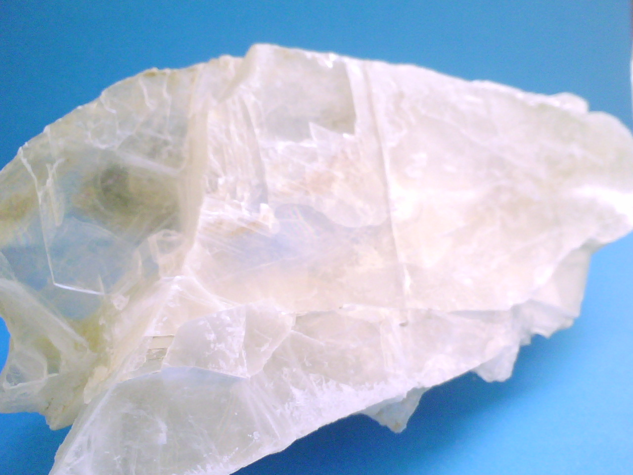 Descrizione =SOLFATO DI CALCIO BIIDRATO